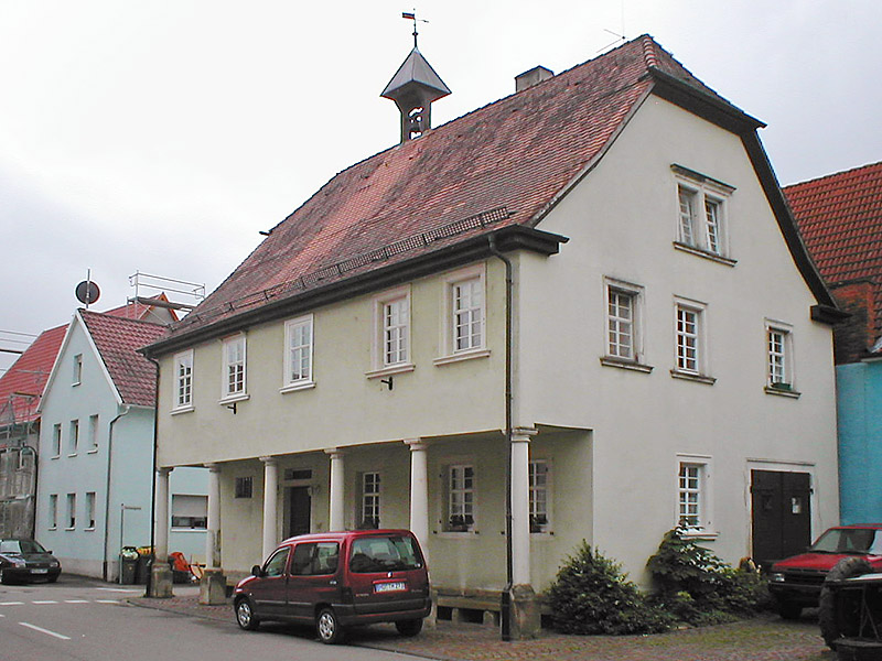 Historisches Wachhaus, zeitweise auch Rathaus, in Sinsheim-Reihen